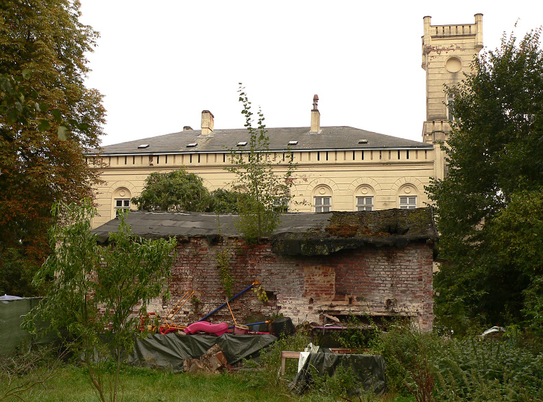 Neustadt Reste Eisenhütte